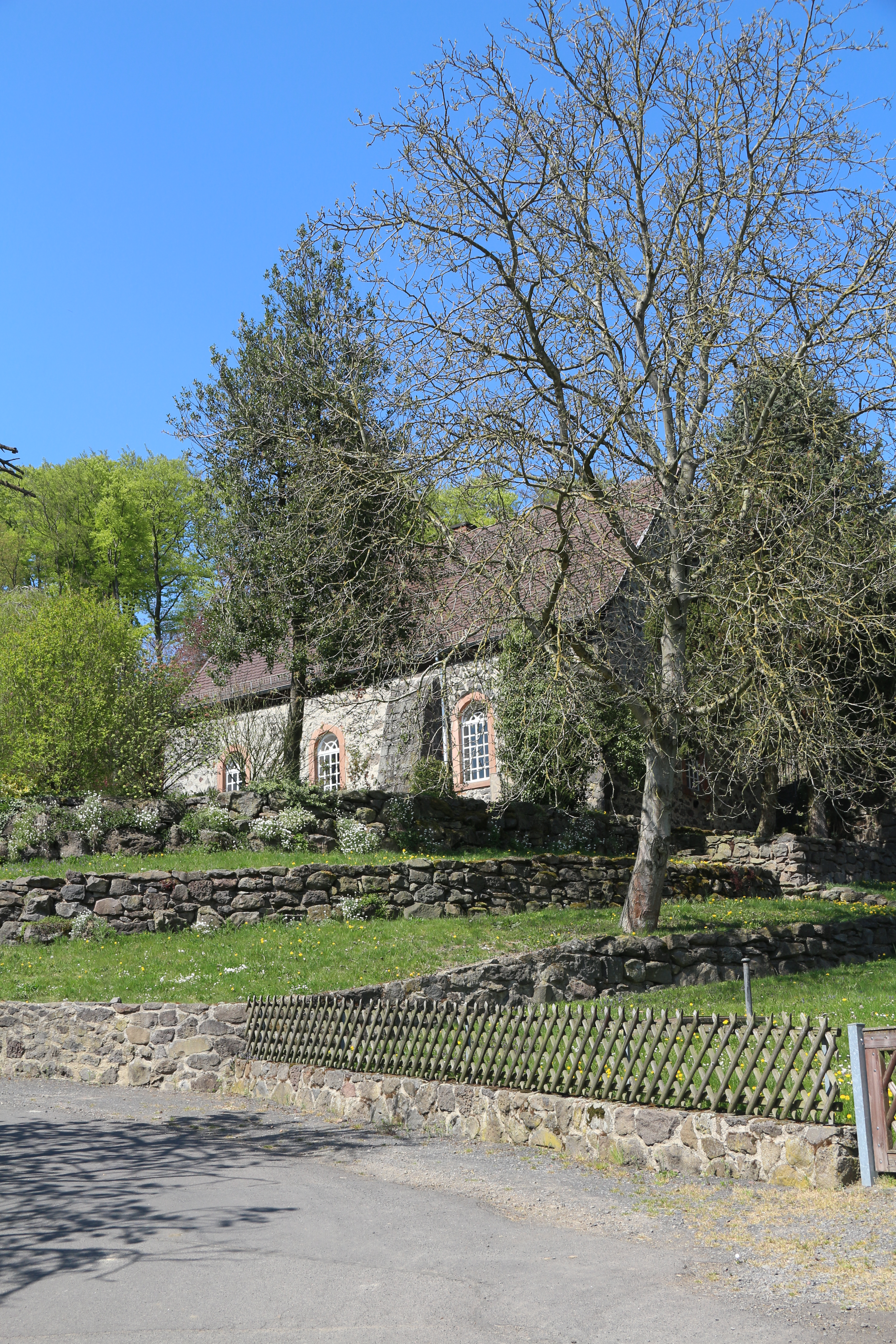 Burgkapelle Nordeck